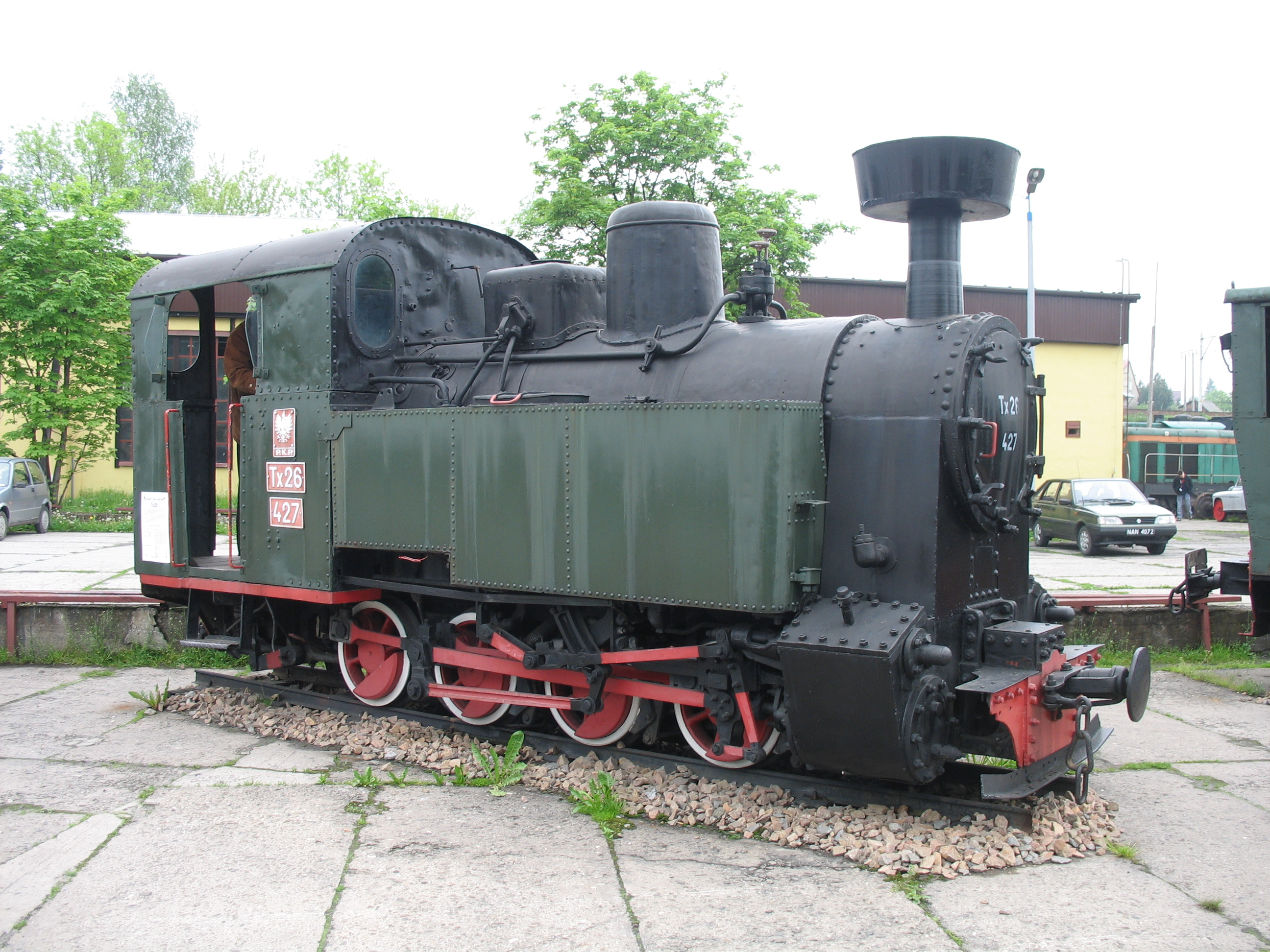 Prototypowa wąskotorowa lokomotywa parowa Tx26-427. Eksponat Skansenu w Chabówce.